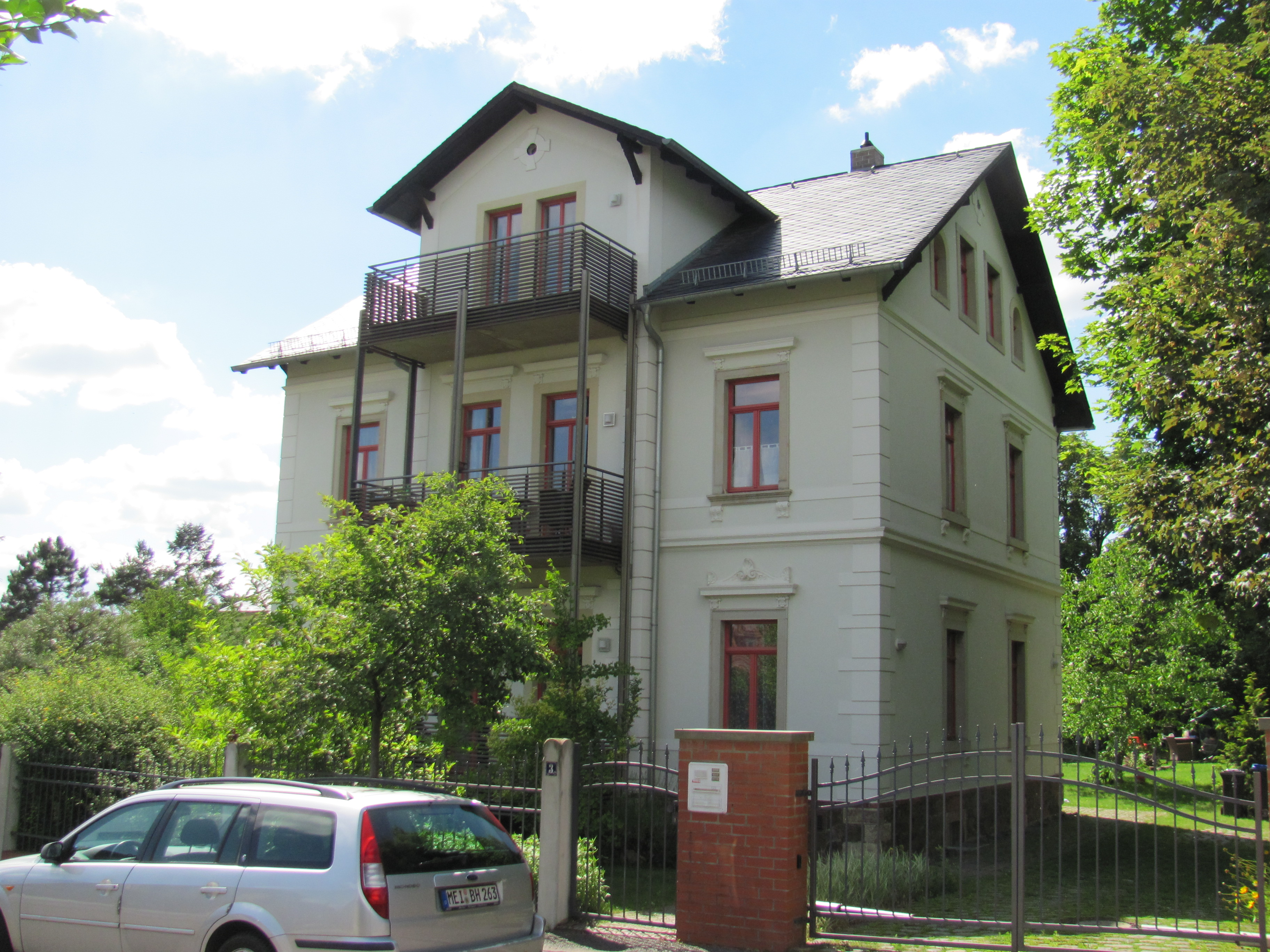 Fehlende Kulturdenkmale nach Wikipedialiste in Heinrich-Heine-Straße, Horst-Vieth-Straße, Humboldtstraße, Dr-Rudolf-Friedrichstraße